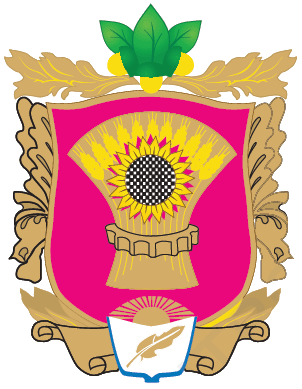 Герб Оріхівського району